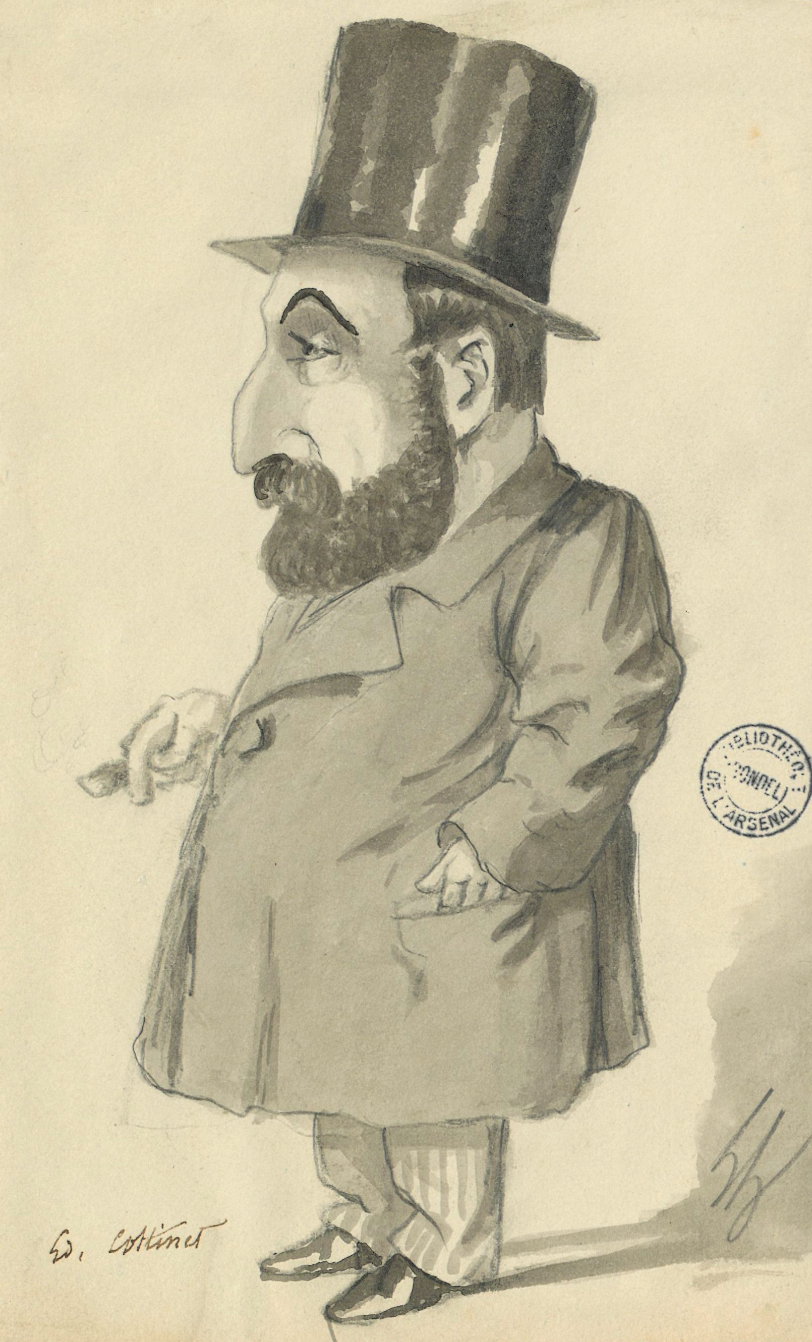 Dessin carricature d'Edmond Cottinet par Lhéritier. 23 x 14 cm. Bibliothèque nationale de France, département Arts du spectacle, ASP 4-O ICO THE-53 (497)